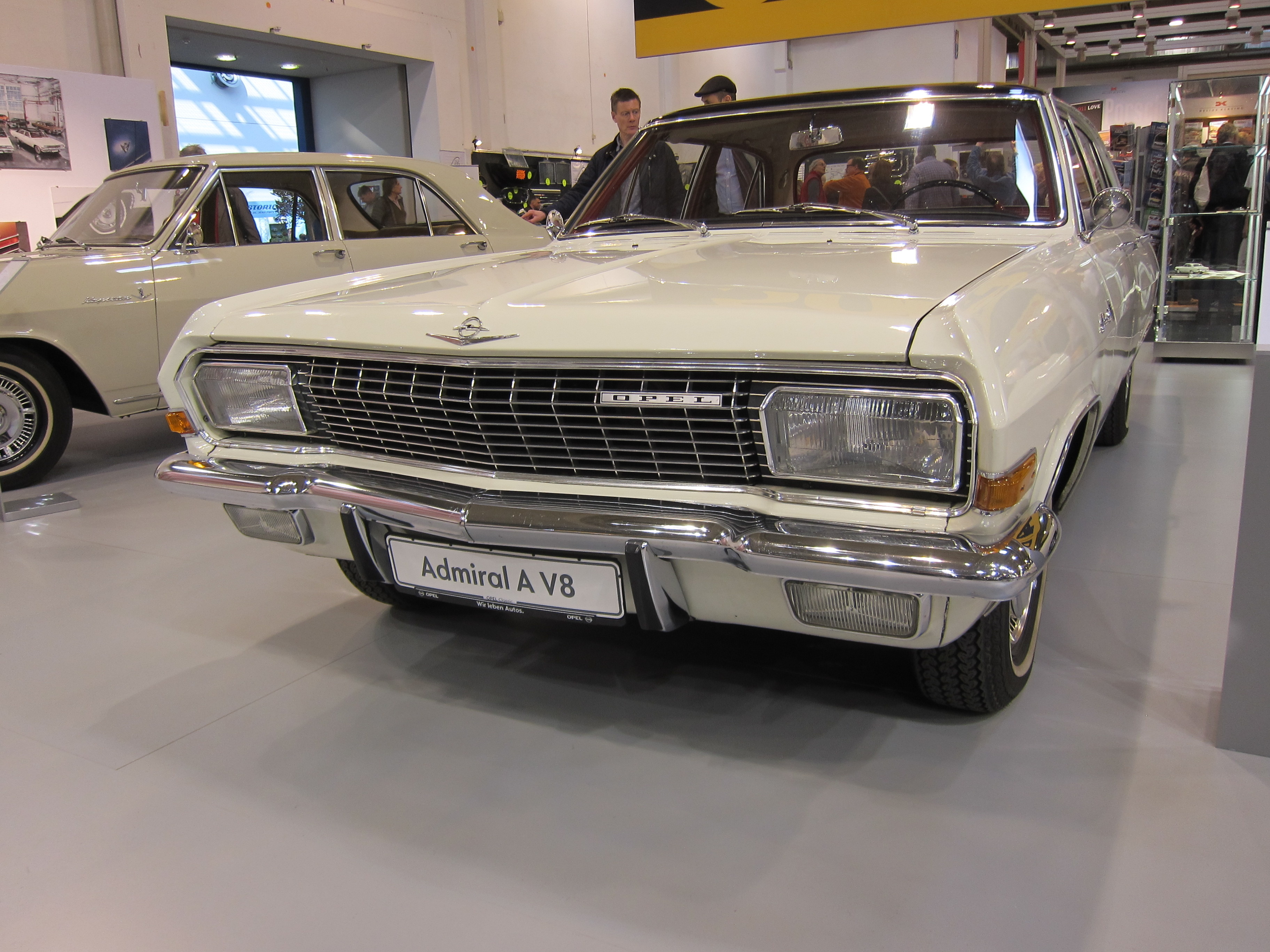 Techno Classica 2014